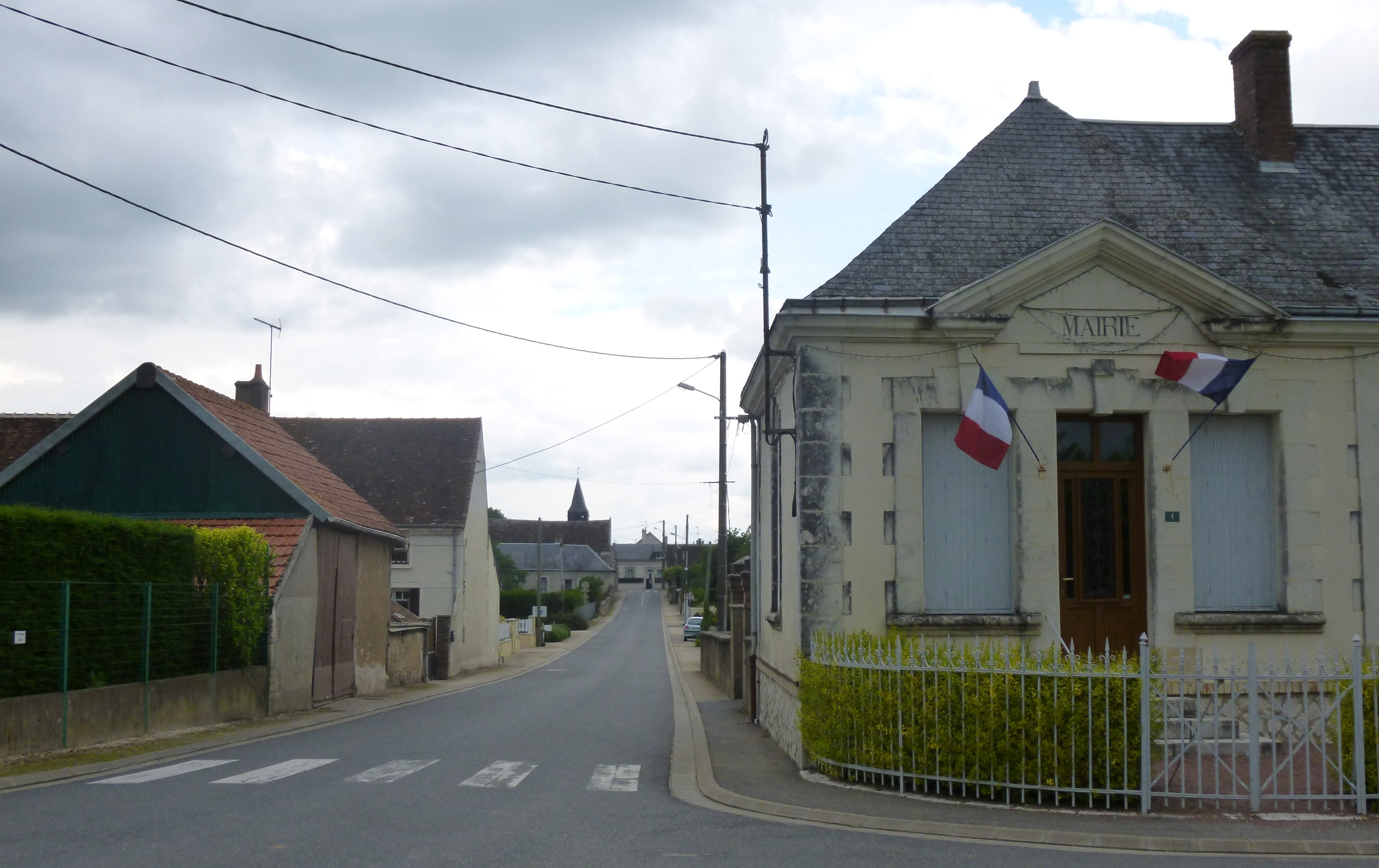 Villiersfaux